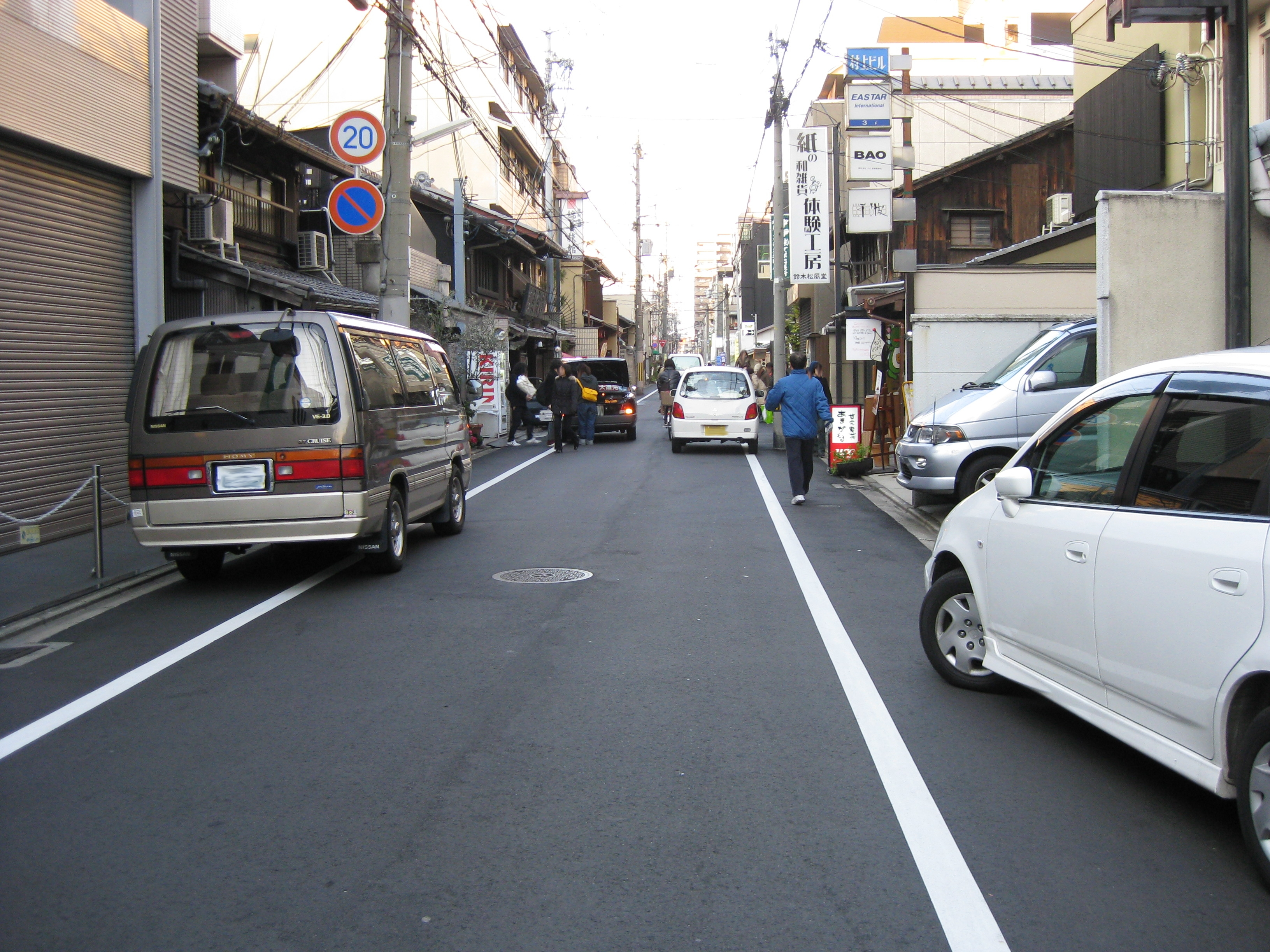 柳馬場通。蛸薬師通より北方向